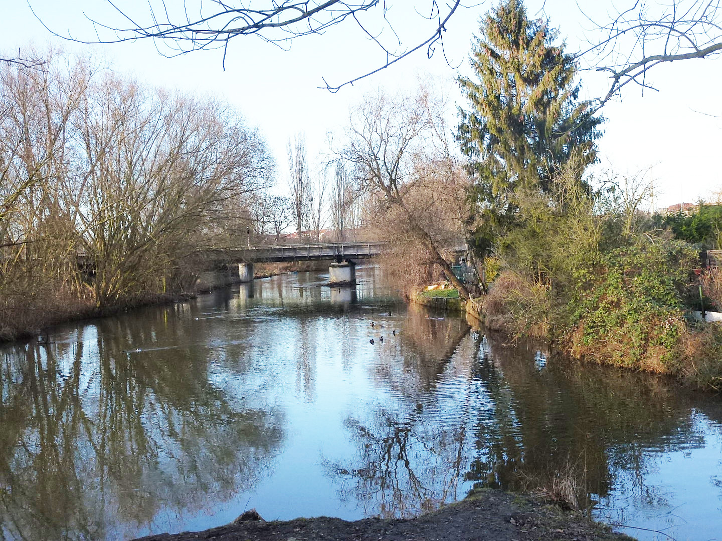 Mündung der Parthe in die Weiße Elster, im Hintergrund die Brücke der Bahnlinie Leipzig–Großkorbetha